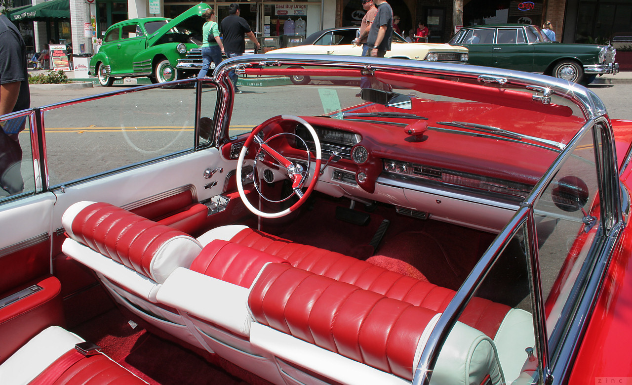 1959 Cadillac convertible coupe - red - 2